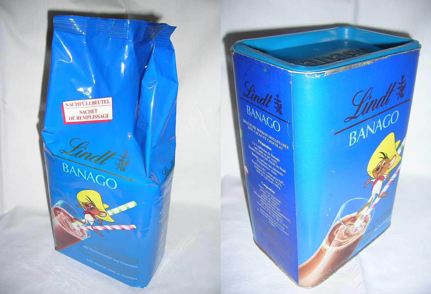 Banago-Büchse und Nachfüllpack